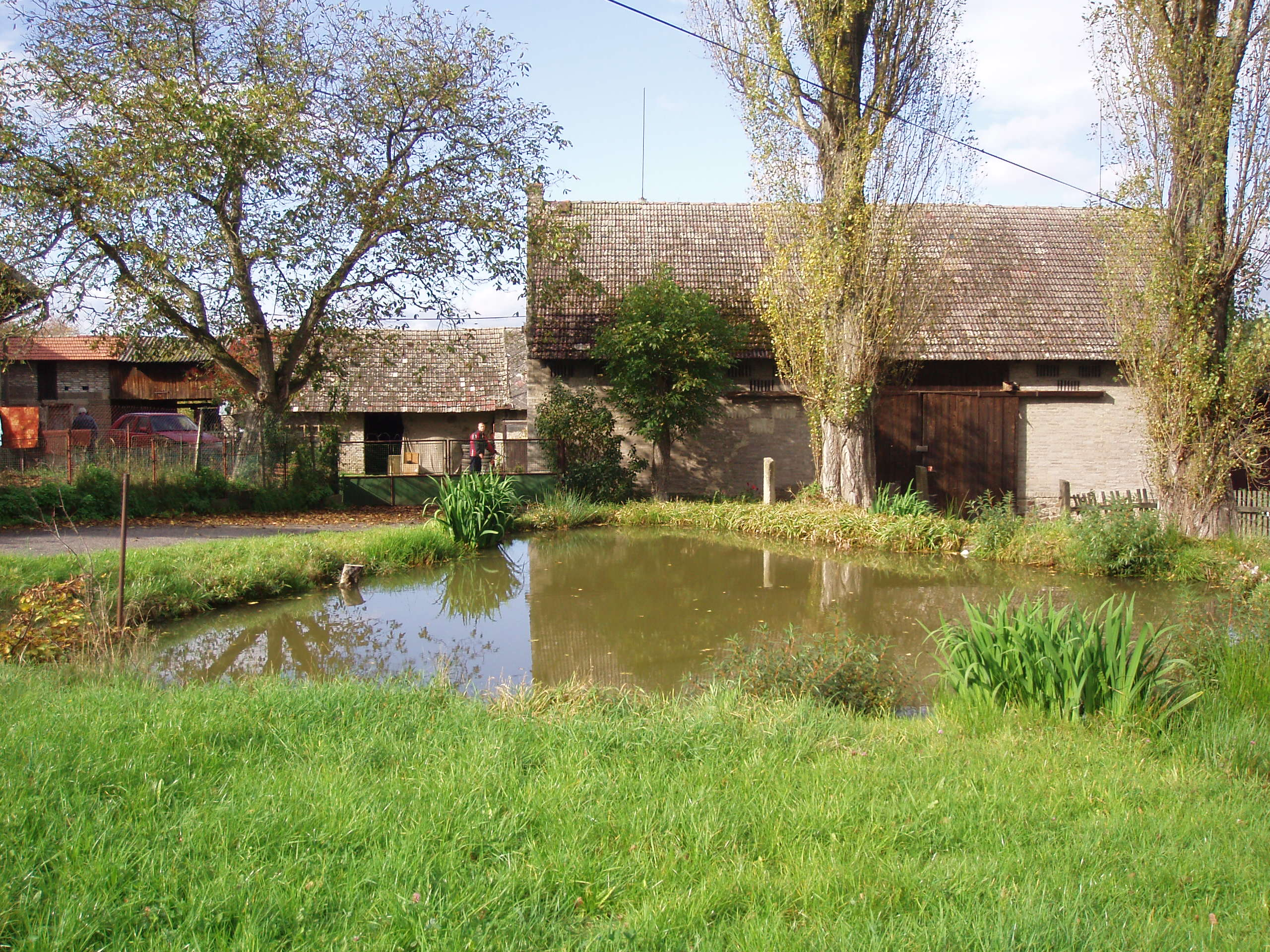 Běřín - vesnička u Jinec